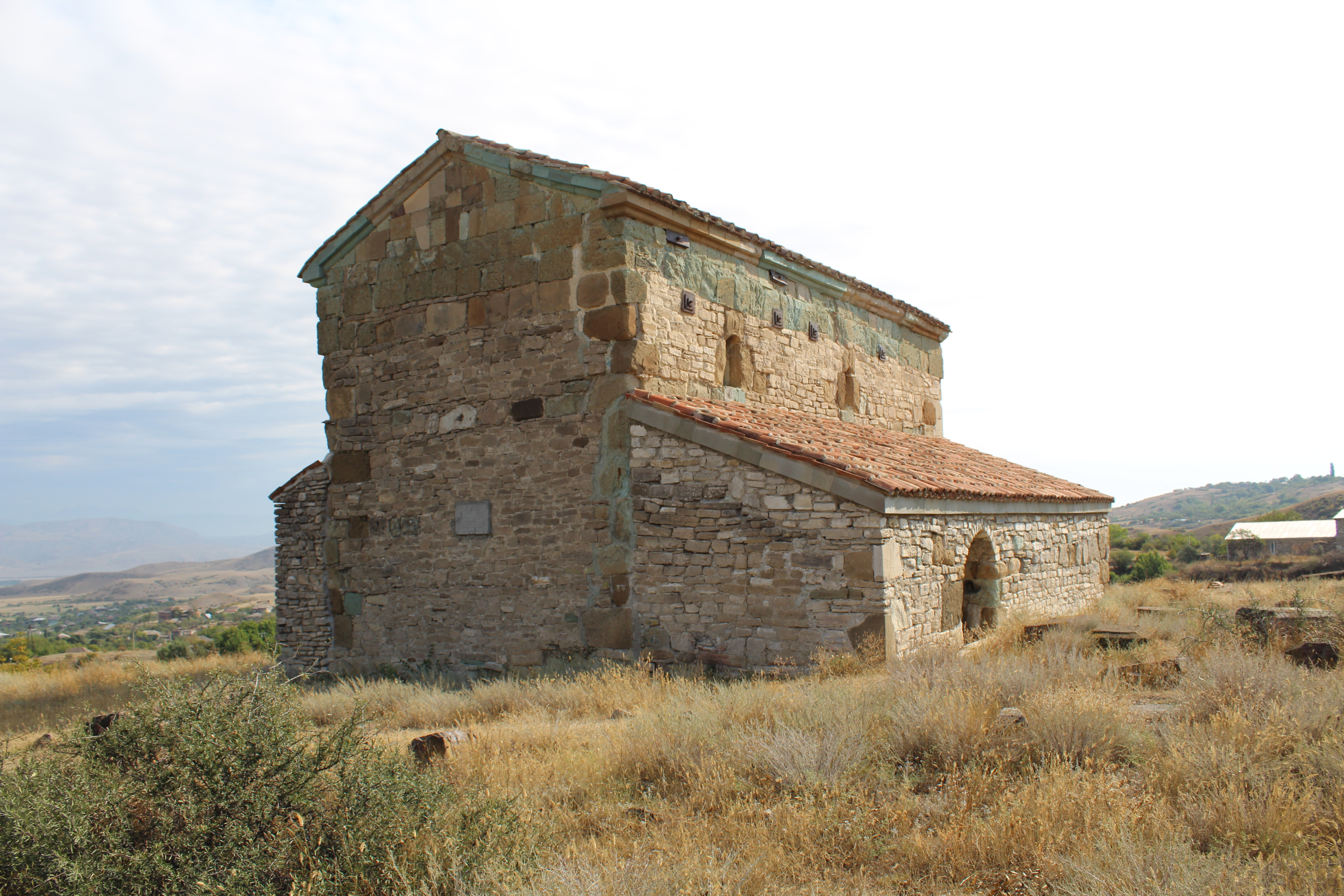 ფავნისის წმინდა გიორგის ეკლესია – წმინდა გიორგის სახელობის ეკლესია კასპის მუნიციპალიტეტის სოფელ გარიყულაში, ძველ სასაფლაოზე. თარიღდება IX-X საუკუნეებით.